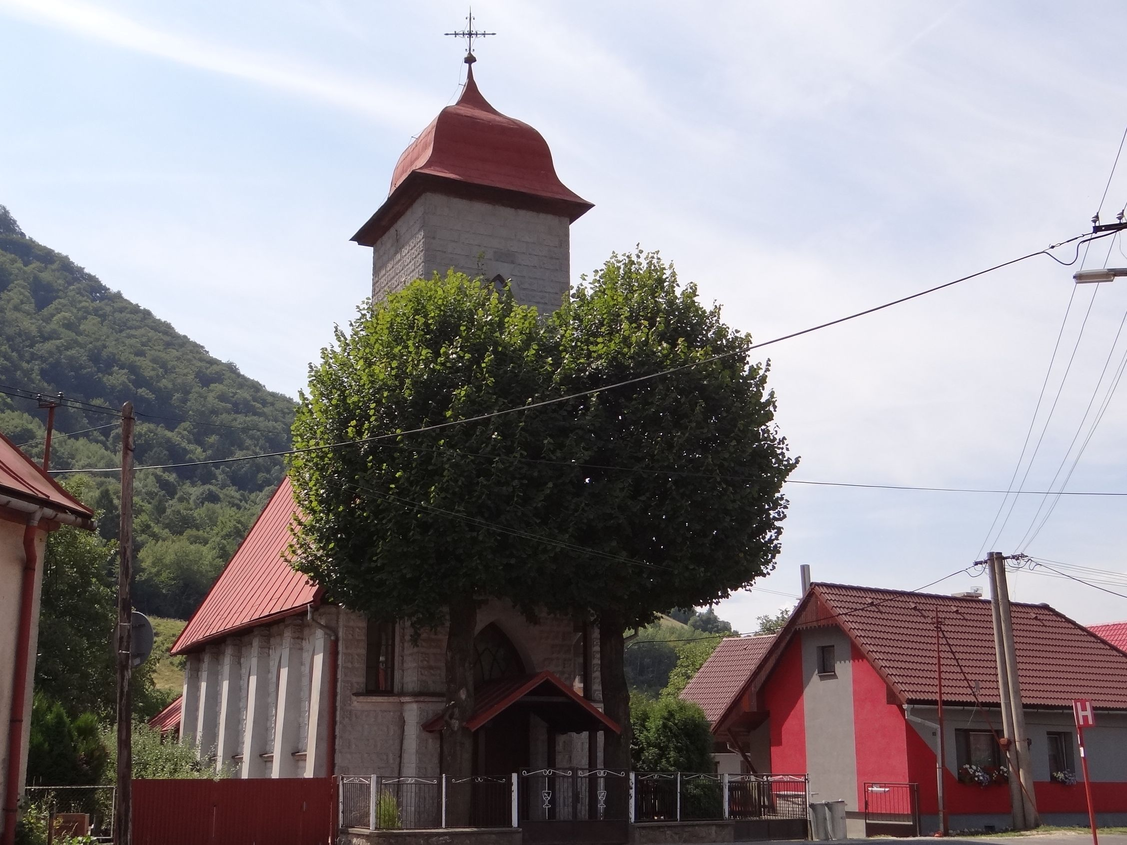 Kraľovany, church